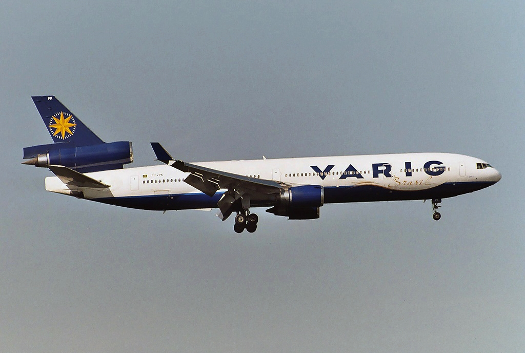 Frankfurt am Main (Rhein-Main AB) (FRA / EDDF / FRF) Germany 9.2004